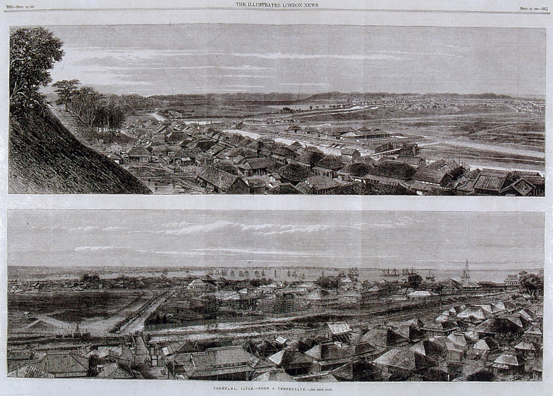 横浜新田競馬場のイラスト 1863年(文久3年)イラストレイテド・ロンドン・ニュース1863年9月12日号掲載